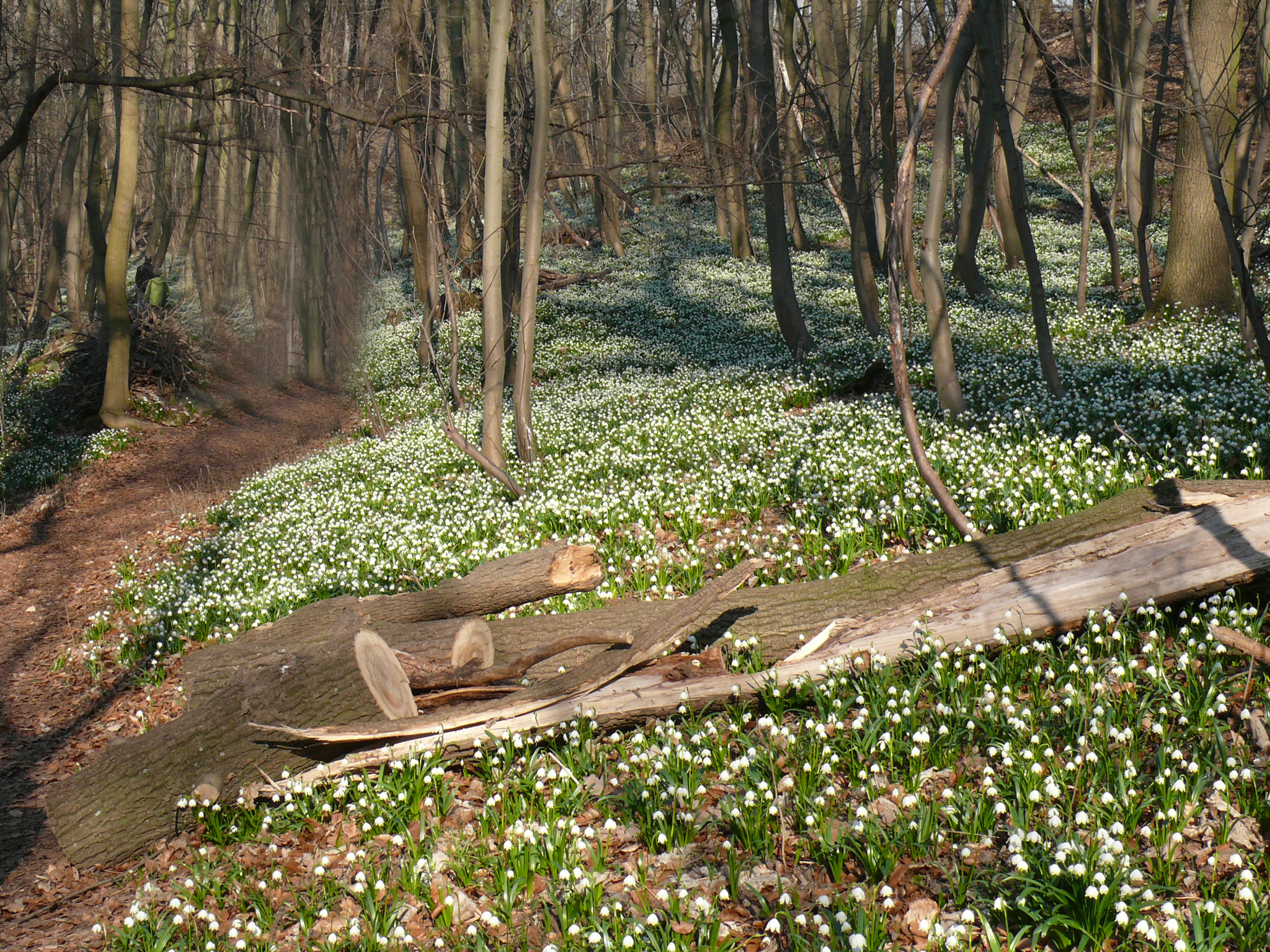 Großer Wildbestand von Märzenbechern bei Ballenstedt, Naturschutzgebiet Gegensteine